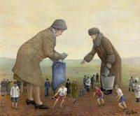 Omslaget till Dear Mamma av Samla Mammas Manna. Målning av Tage Åsén